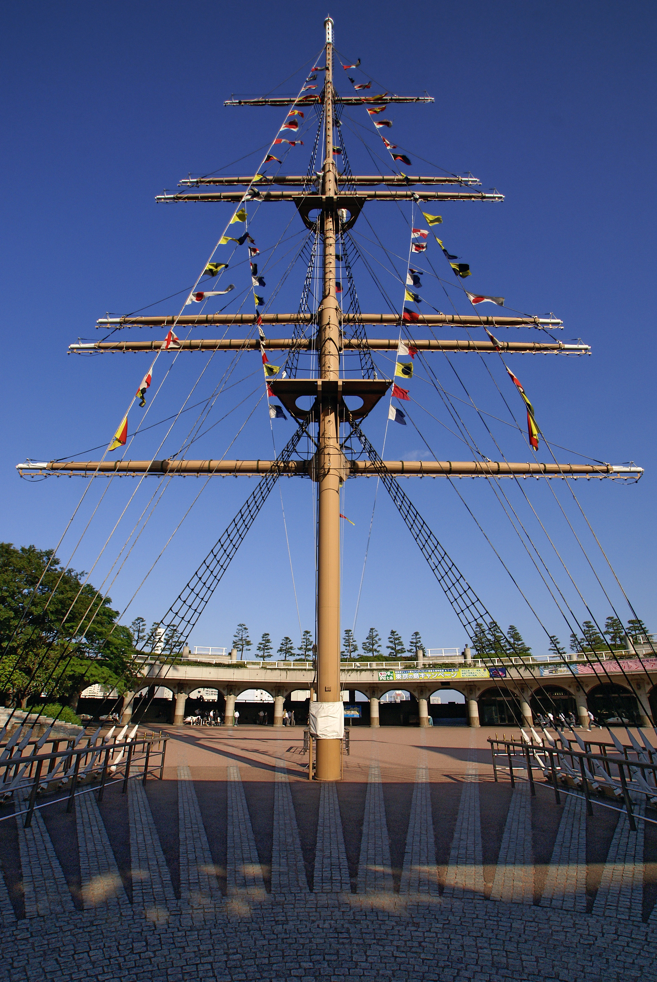 Takeshiba-futo Park in Minato-ku, Tokyo, Japan